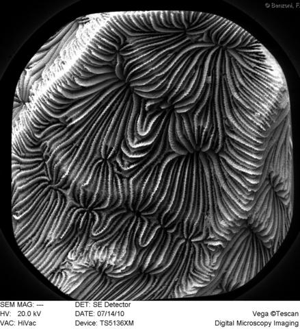 Leptoseris yabei, vista de coralitos con microscopio digital.